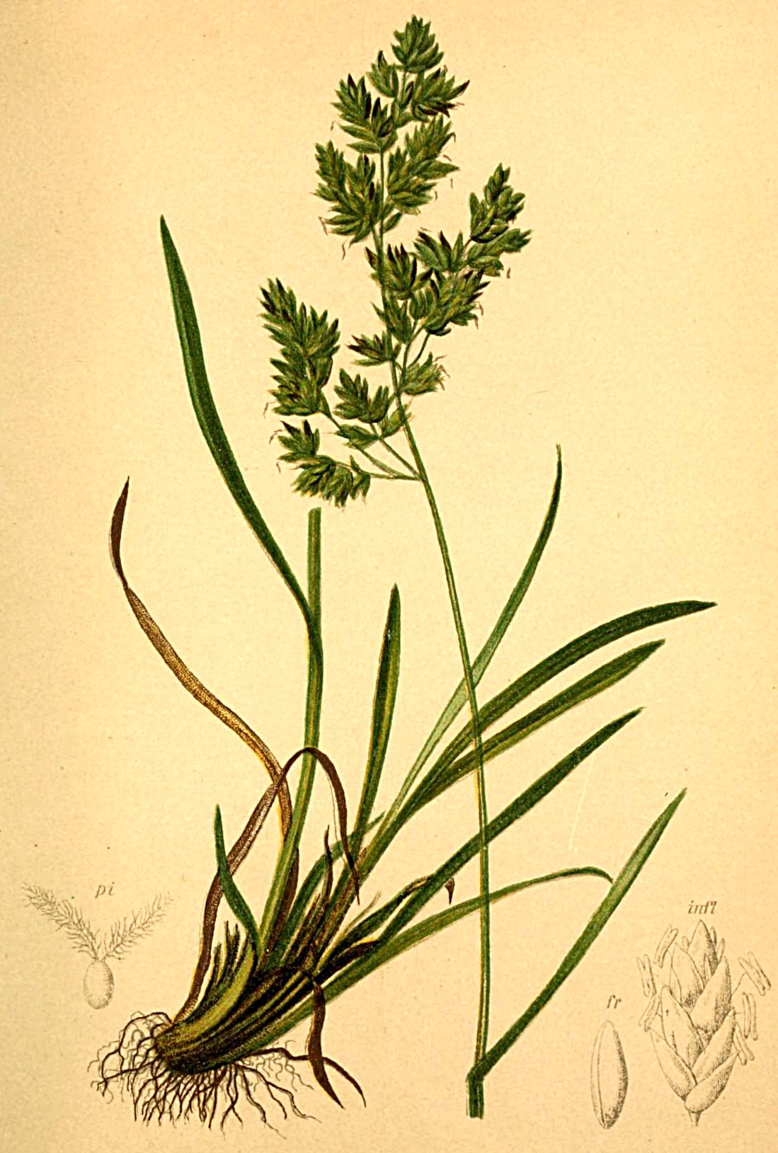 Poa alpina